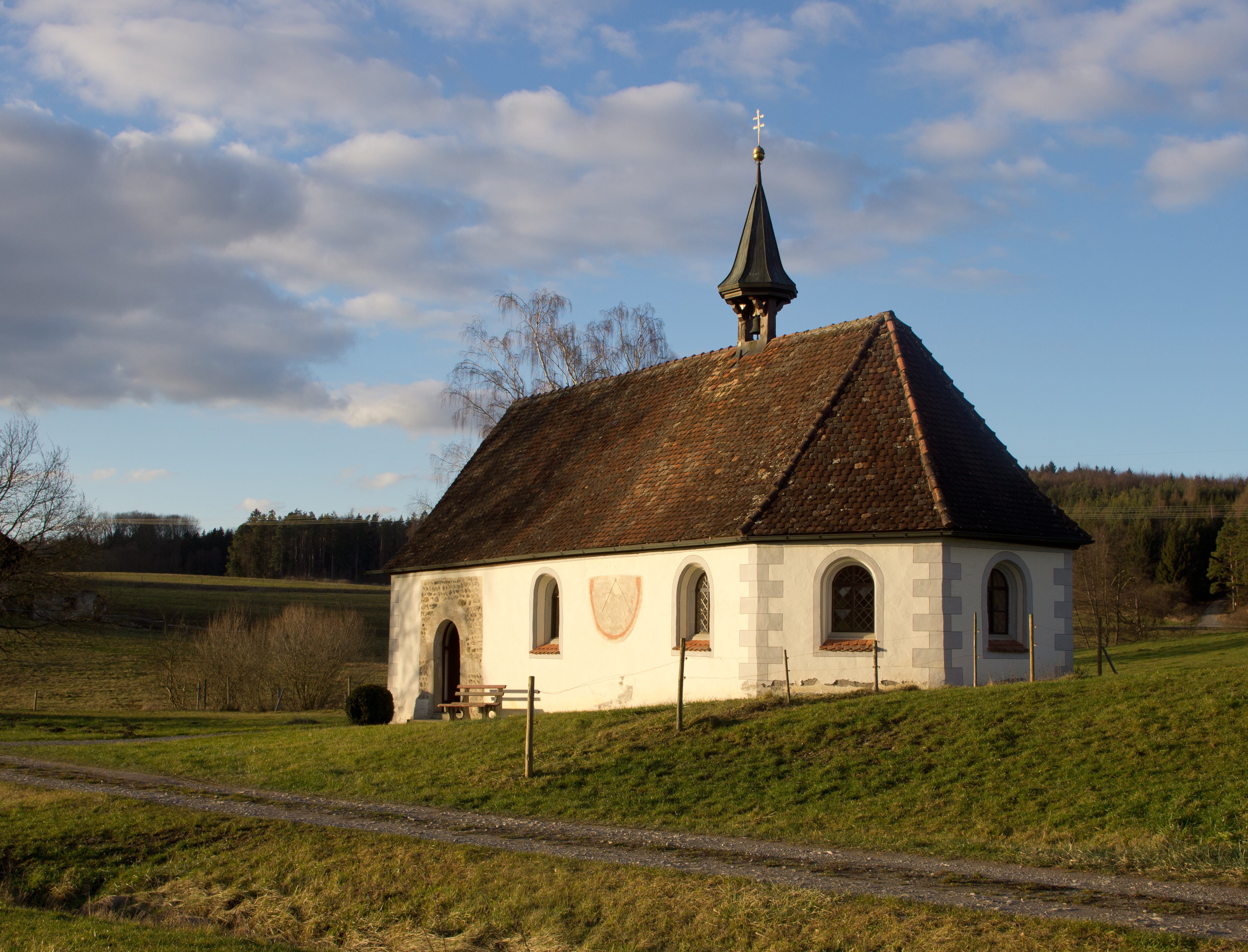 Dreifaltigkeitskirche Braitenbach, zwischen Stetten und Markdorf. Die Dreifaltigkeitskapelle war und ist eine Anlaufstelle der Jakobspilger. Im Inneren finden sich alte, mit Rötelstift aufgetragene Grafitti